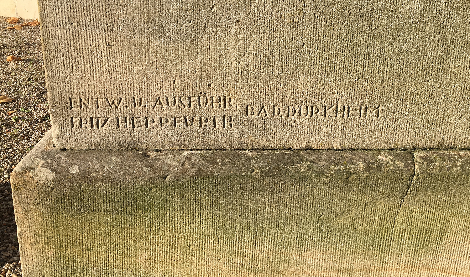 Das von Fritz Herrfurth 1929 gestaltete Kriegerdenkmal am Alten Friedhof (Hauptstraße) in der Gemeinde Dannstadt-Schauernheim, Ortsteil Dannstadt – Sockelinschrift.